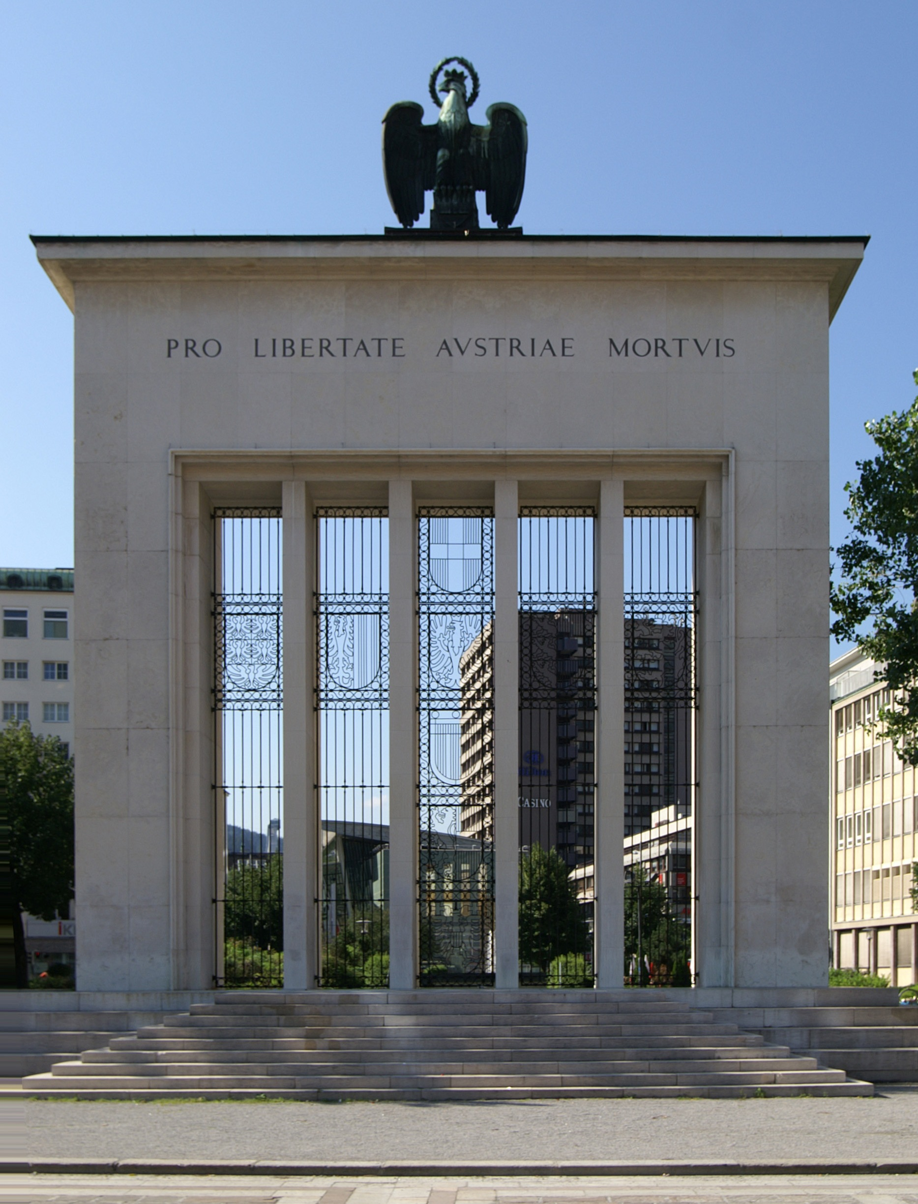 Befreiungsdenkmal (Innsbruck) steht am Eduard-Wallnöfer-Platz 1945